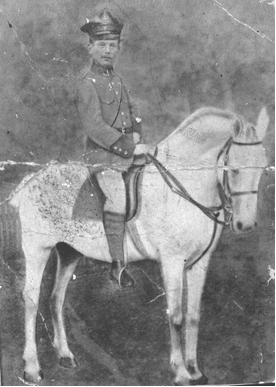 Józef Tytko, polski bohater I Powstania Śląskiego.